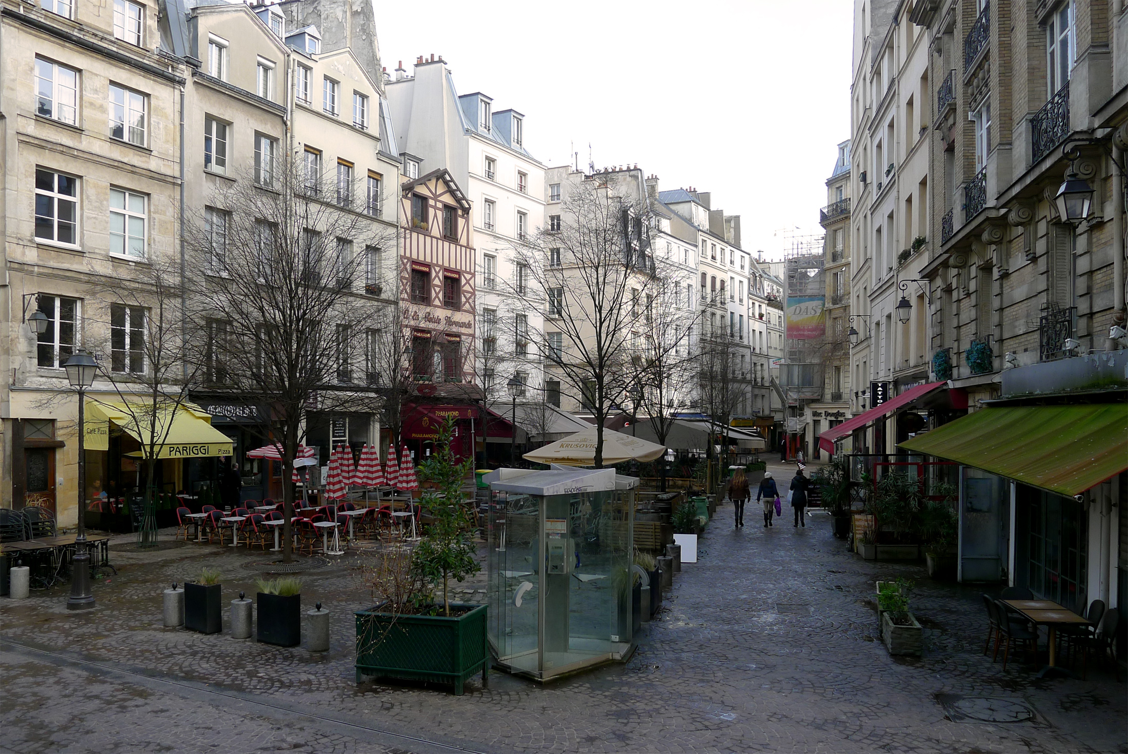 Place formée par les rues de la Petite et Grande Truanderie - Parie Ier